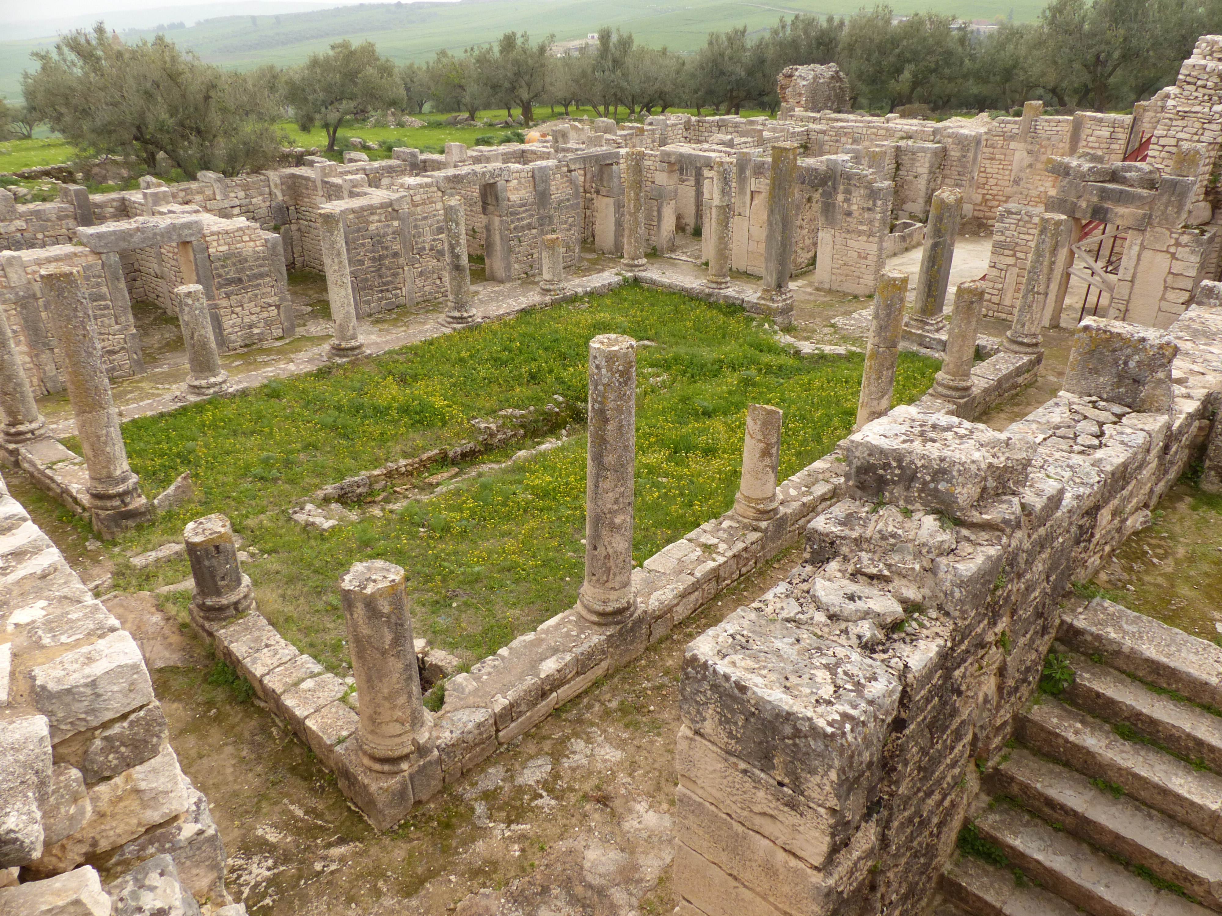 Les ruines de la villa dite du Trifolium à Dougga, en Tunisie